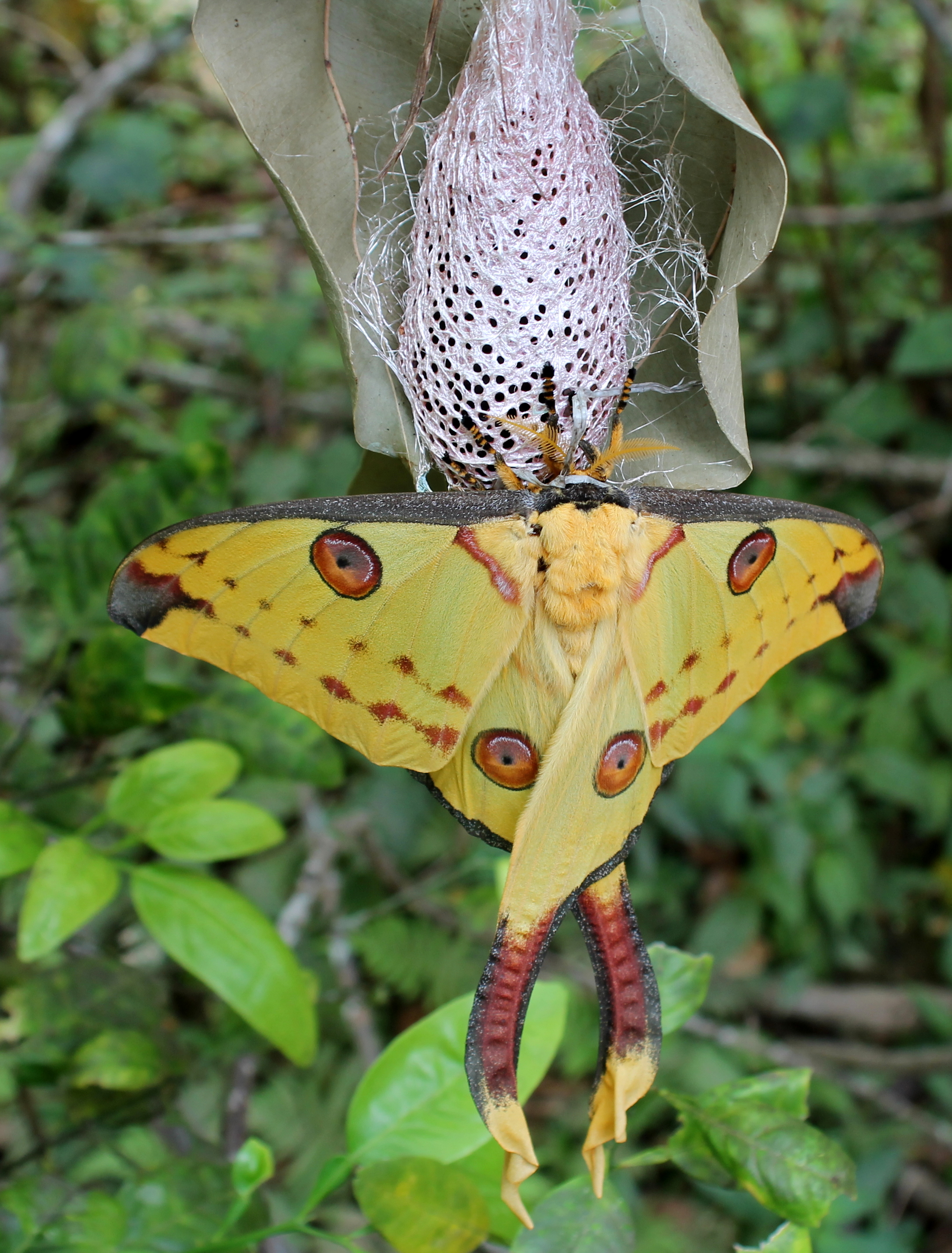 Komeetstaartvlinder in Peyrieras reptile reserve